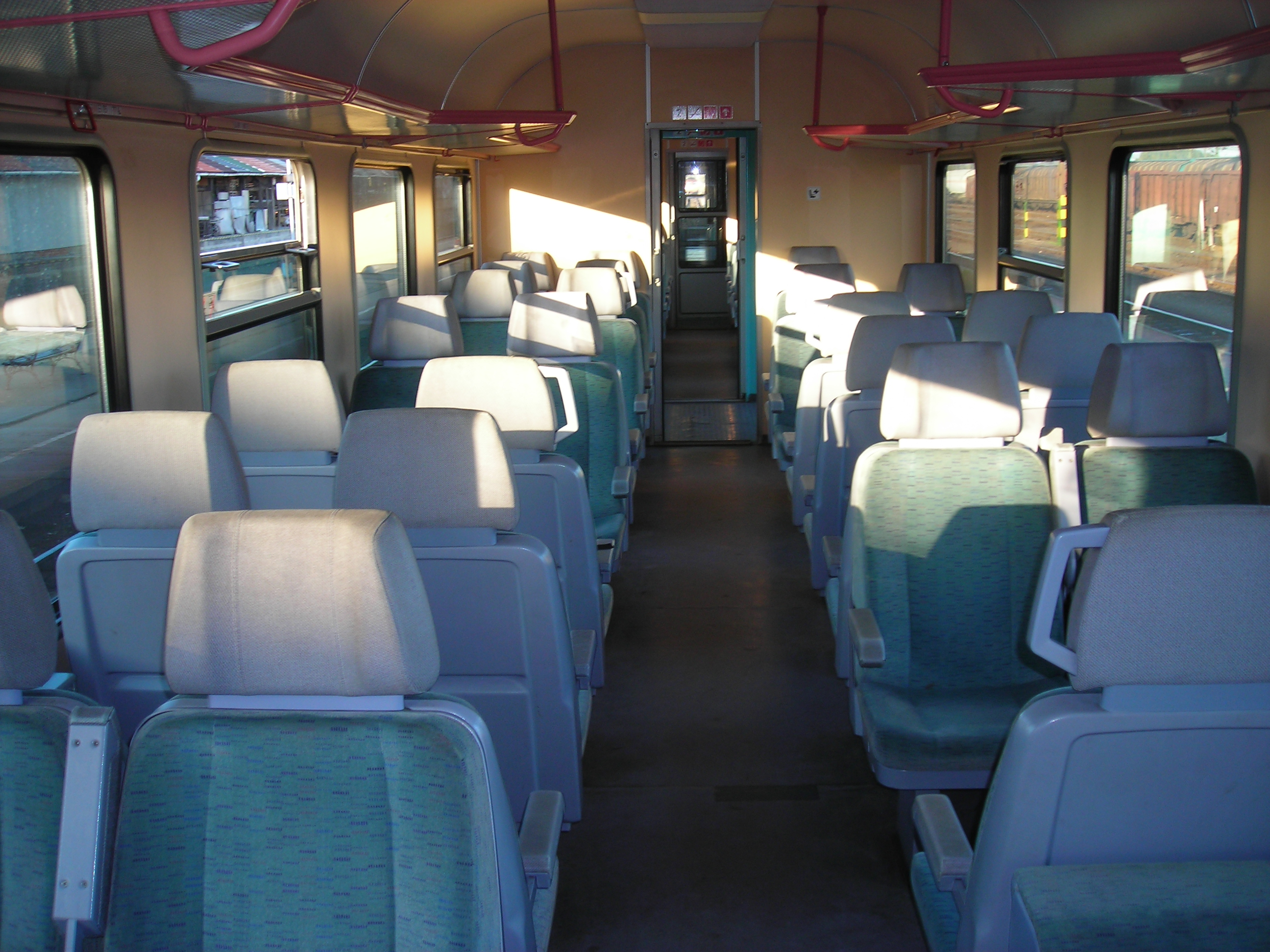 Régi német kocsi belseje